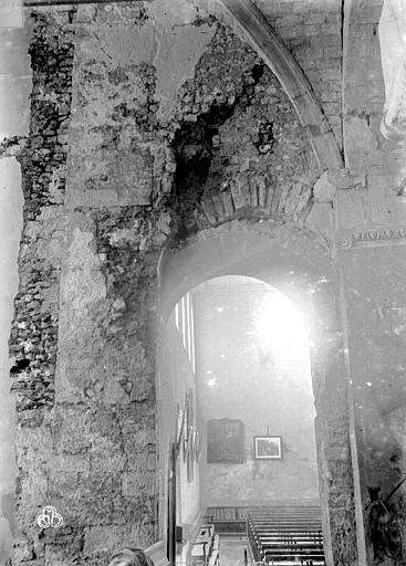 Croisillon sud, vue vers l'ouest dans la nef.